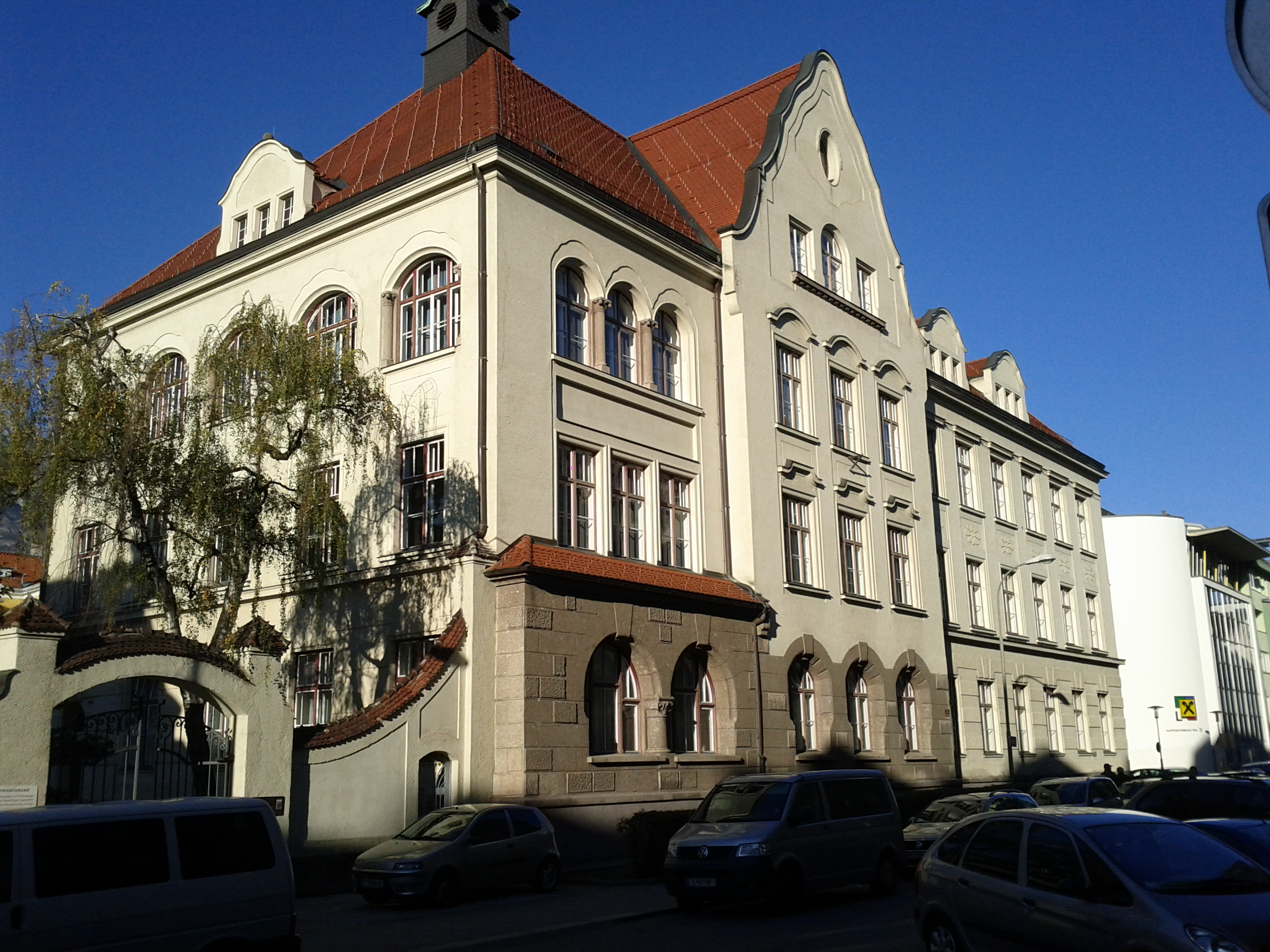 Hauptschule Wilten mit Einfriedung